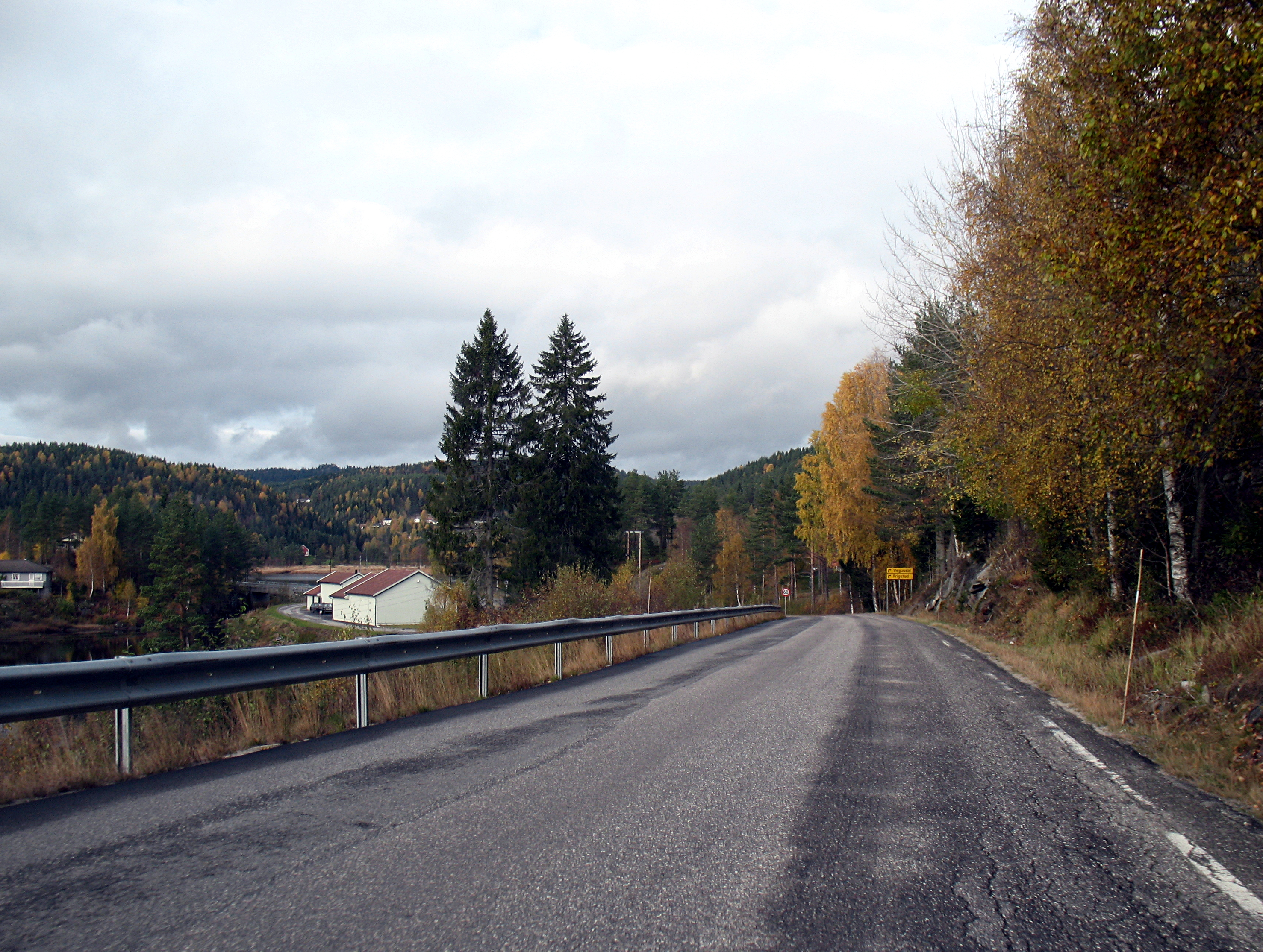 Fylkesvei 403 i Aust-Agder ved Iveland.